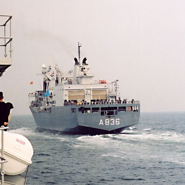 Hr. Ms. "Amsterdam" op de Noordzee Categorie:Afbeelding schip